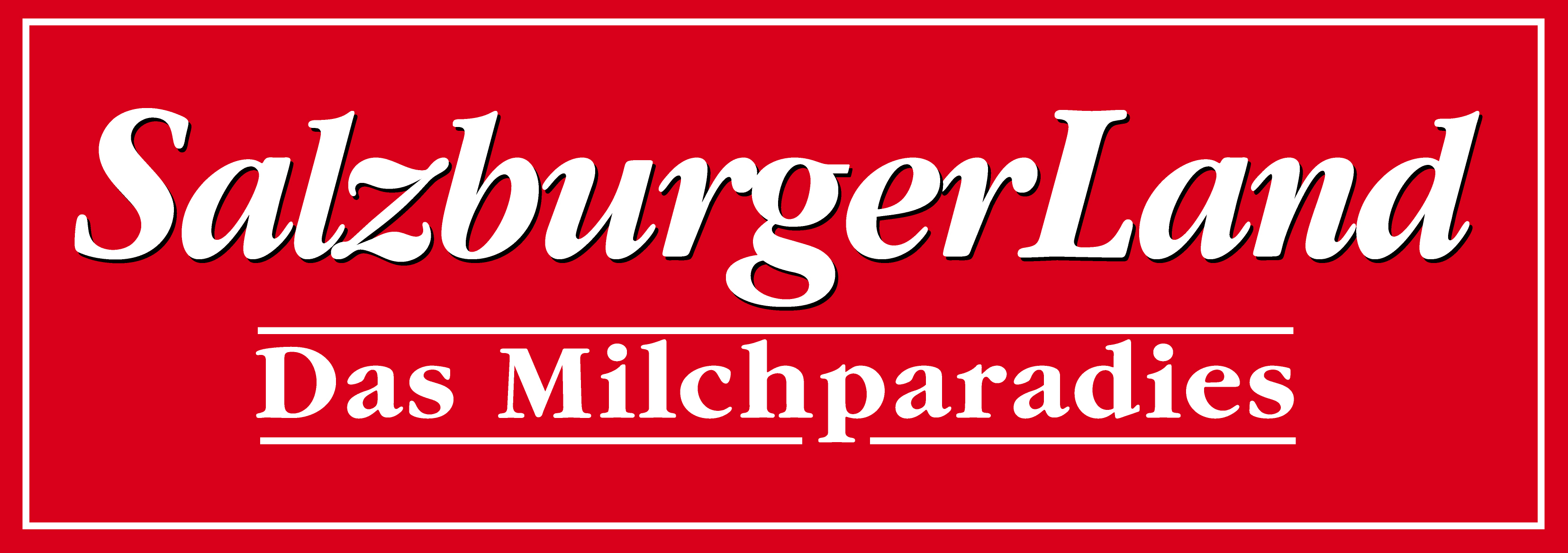 Logo von Alpenmilch Salzburg